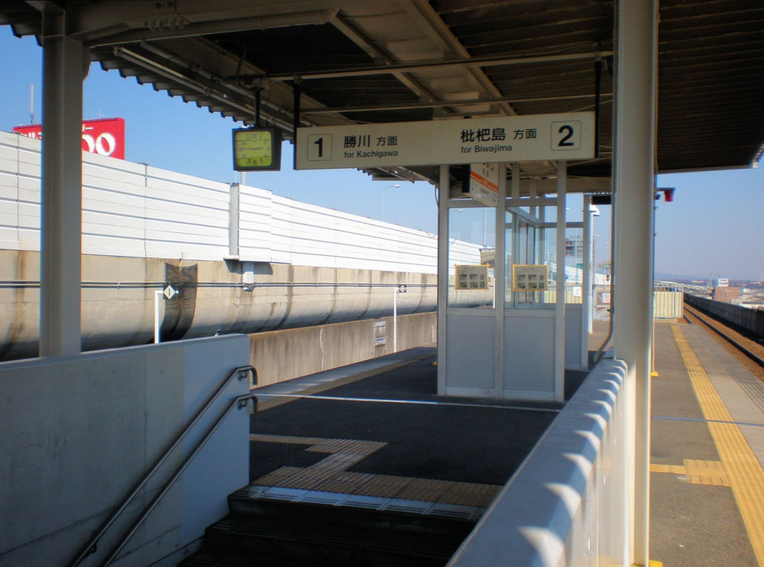 愛知県春日井市にある東海交通事業味美駅